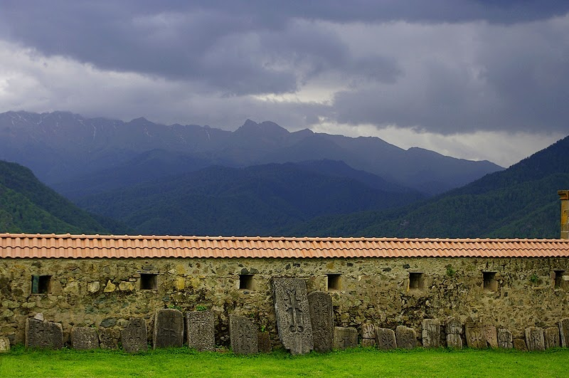 Стена Гандзасара